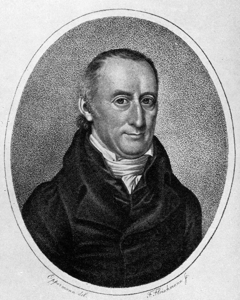 Johann Hyacinth Kistemaker (1754-1834), katholischer Theologe, Gymnasialdirektor und Philologe. Radierung in Punktmanier von F. Fleischmann nach einer Zeichnung von Oppermann.